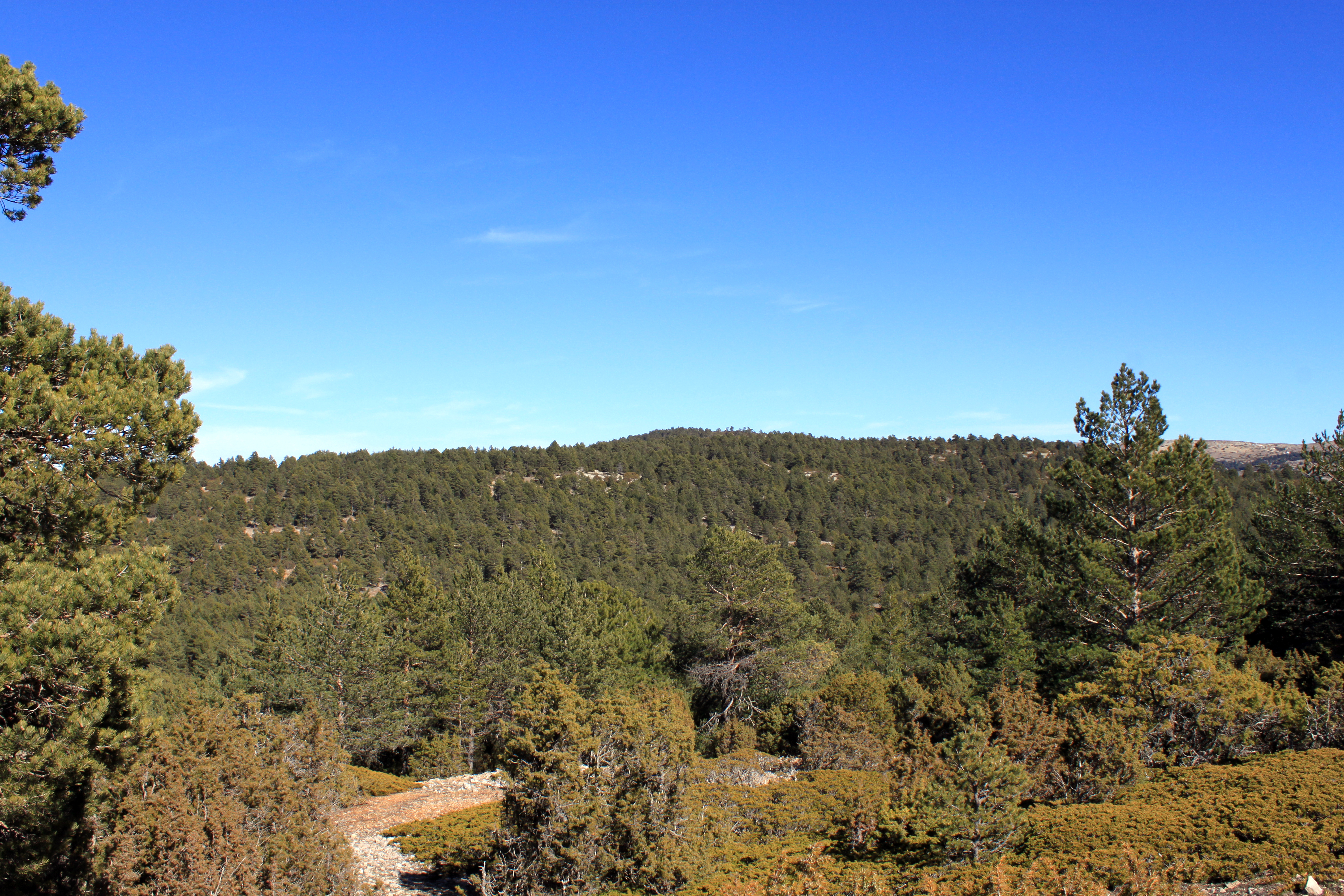 Alto de Las Barracas o Cerro Calderón desde la cima de El Gavilán en el Parque natural Puebla de San Miguel, provincia de Valencia, Comunidad valenciana, España.